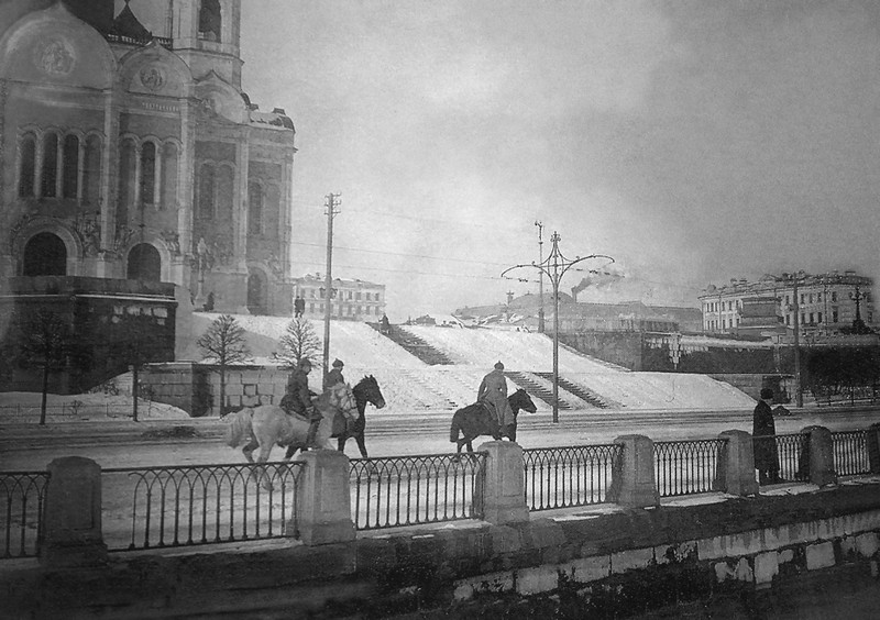 Конные милиционеры у храма Христа Спасителя в Москве